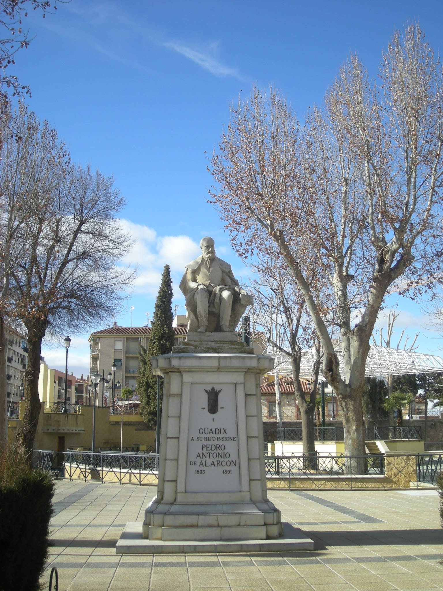 Estatua de Pedro Antonio de Alarcón en Guadix.